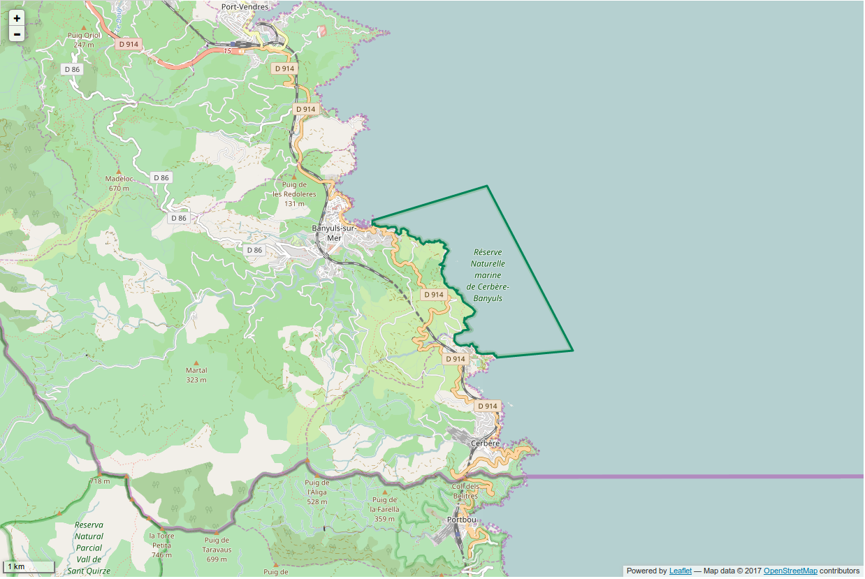 Périmètre de la RNN de Cerbère Banyuls.